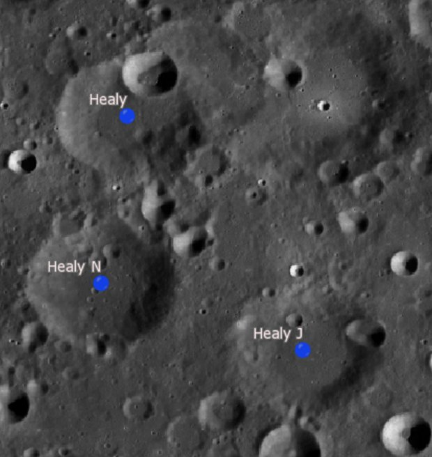 Cráter lunar Healy. Cráteres satélite. (Imagen LRO)